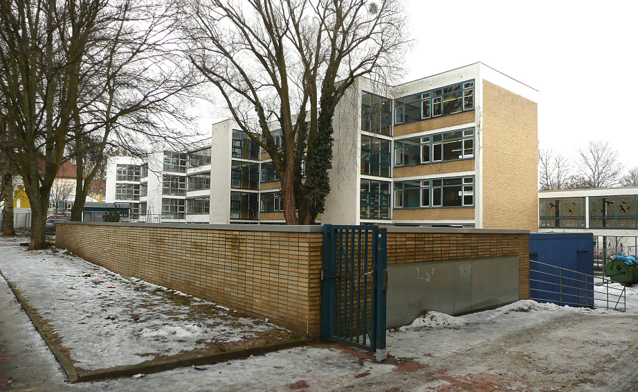 Humboldtschule